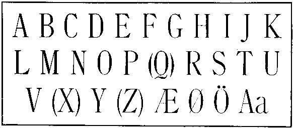 Udsnit fra: Hanebogen. Læsebog med Billeder 1. Del udgivet af Julie Heins. København 1890.